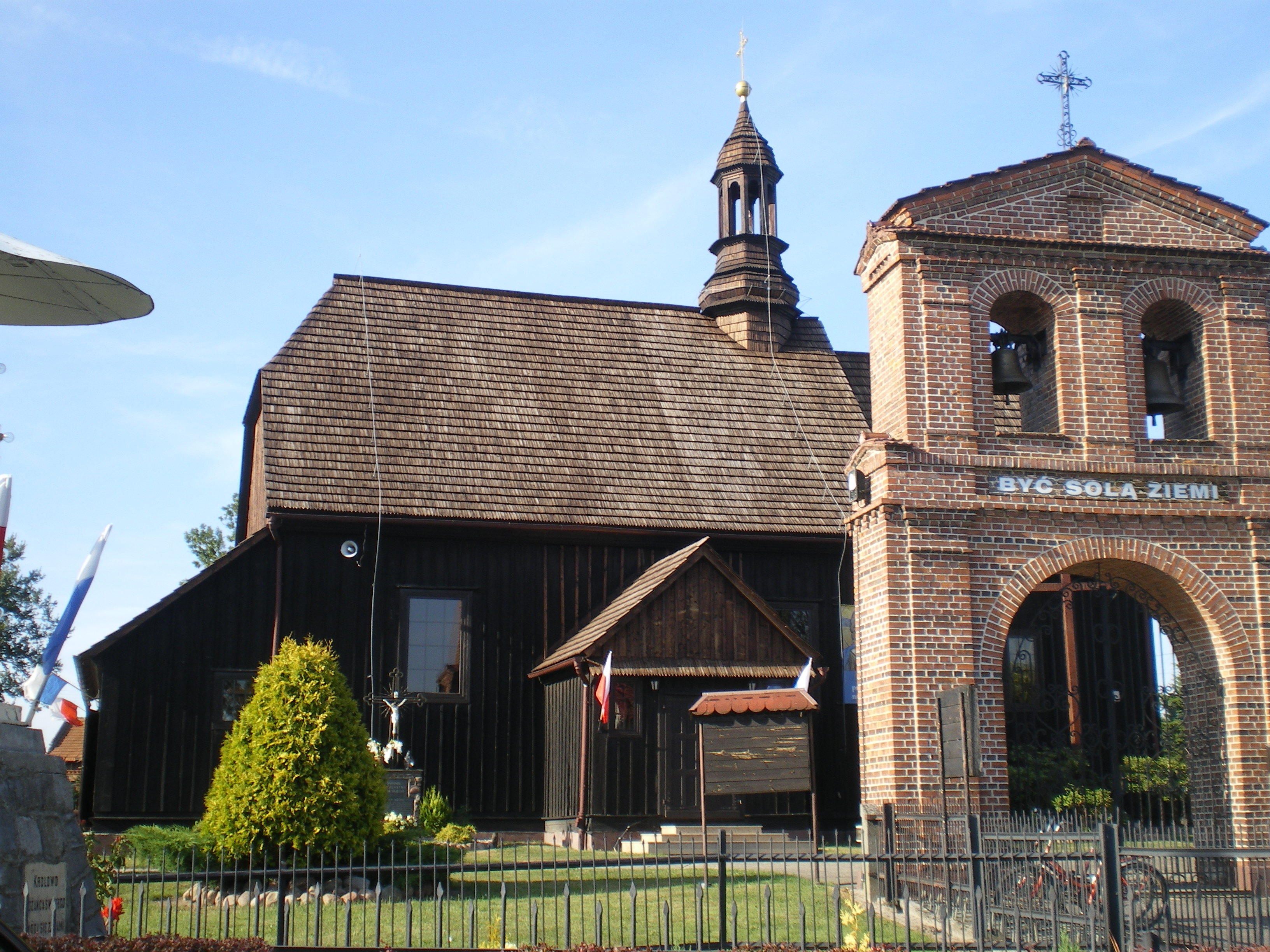 Chróścin, kościół św. Mikołaja, 1734, 1919